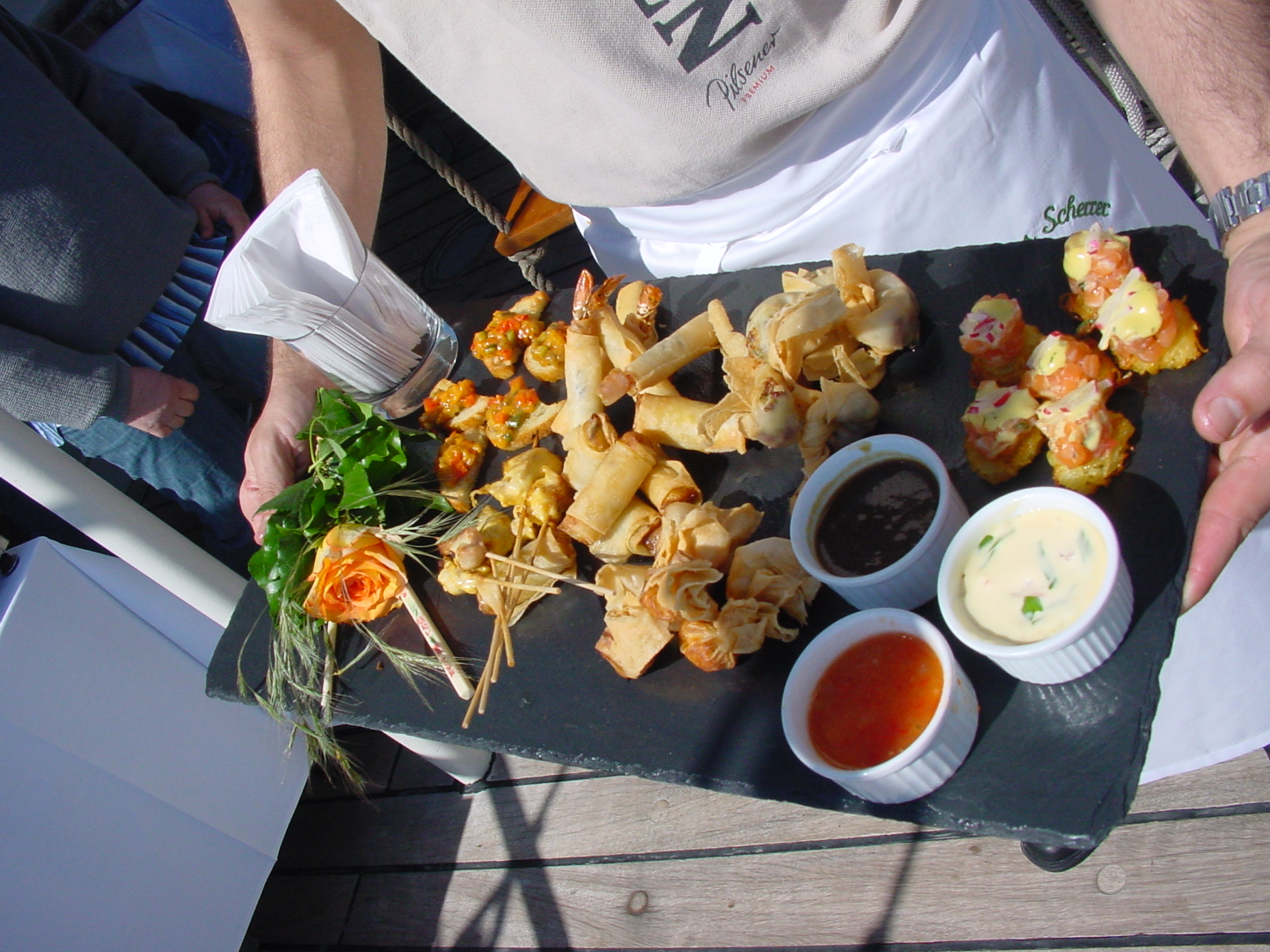 Fingerfood auf einer Schieferplatte angerichtet mit dreierlei Dips. Aufgenommen von Heinz Wehmann.